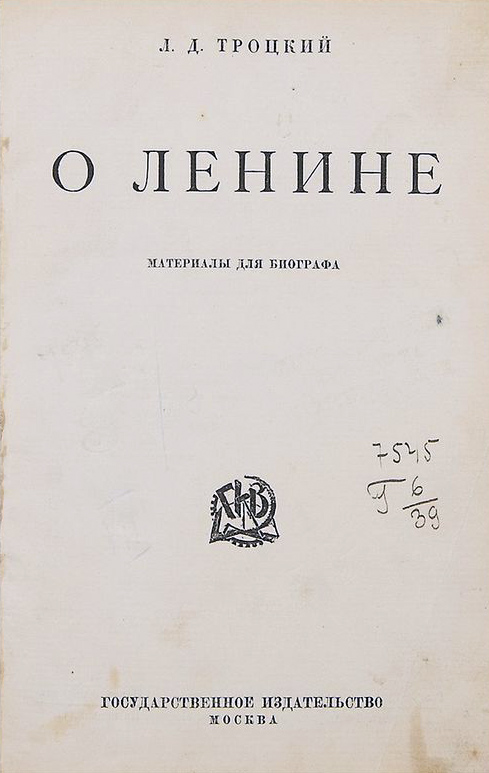 Троцкий - О Ленине (1924, обложка)